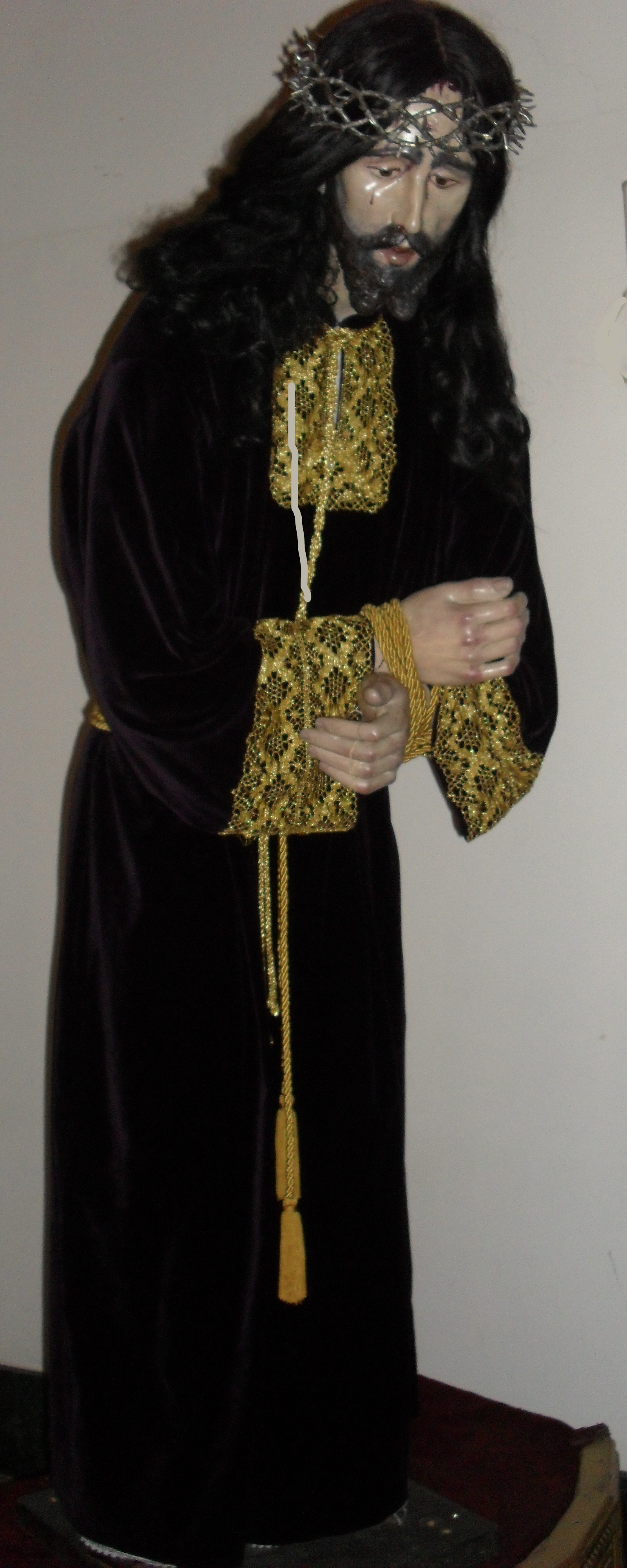 Nazareno de Roquetas de Mar sin la cruz.